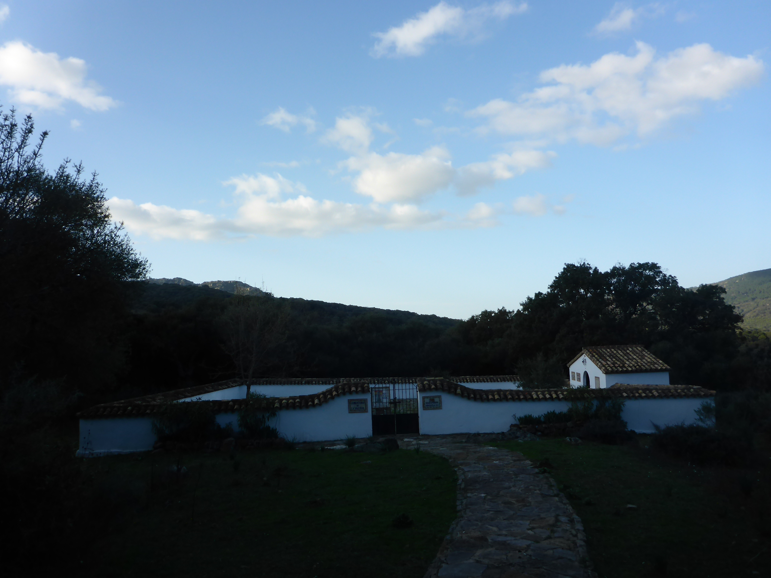 Vista general del Cementerio de La Sauceda (provincia de Málaga, España)